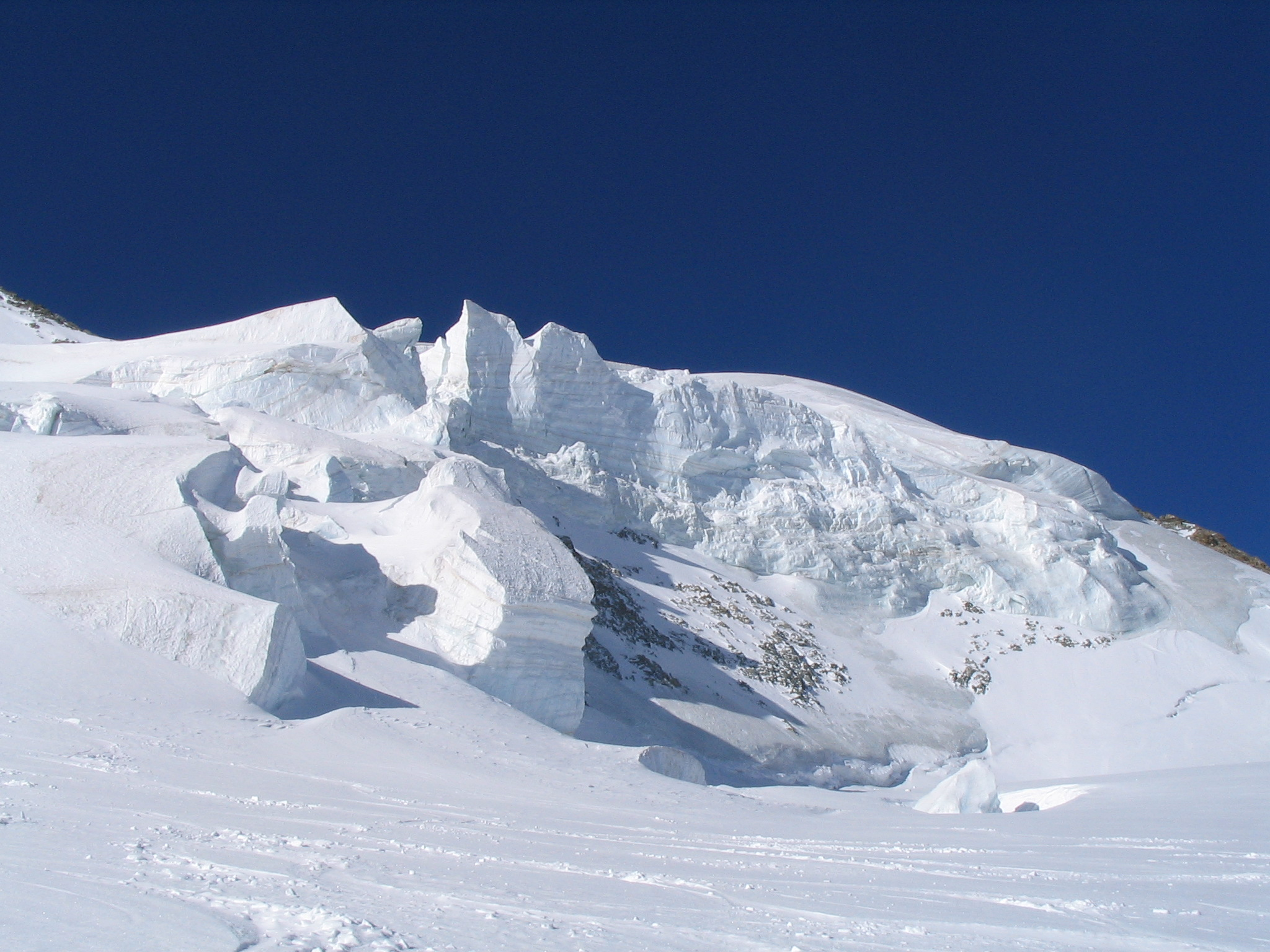 sérac sur le galcier blanc qui mène au dôme des écrins avril 2006 Licensing Catégorie:Sommet des Alpes Catégorie:Massif des Écrins catégorie:montagne